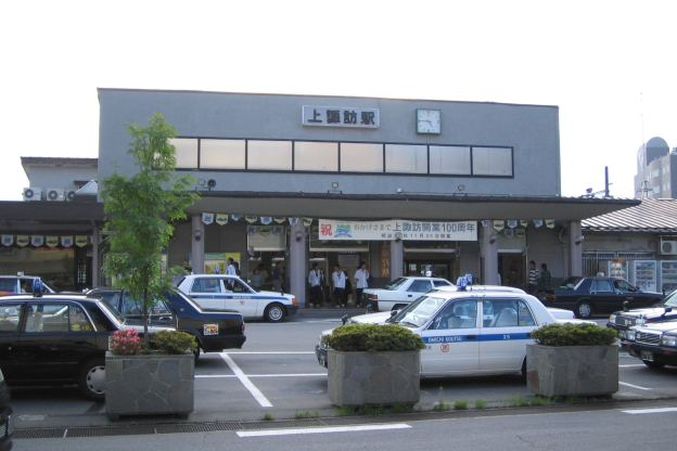 上諏訪駅概観